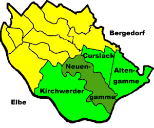 Lage des Kirchspiels Neuengamme, einem Stadtteil von Hamburg, in den Hamburger Vier- und Marschlanden und im Bezirk Bergedorf.